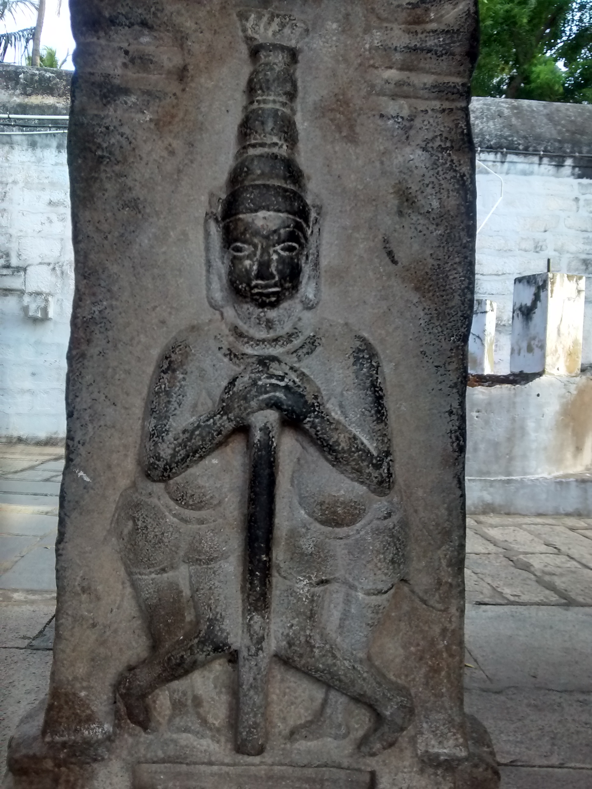 பேட்டவாய்த்தலை மத்யார்ஜுனேஸ்வரர் கோயில் சிற்பம்